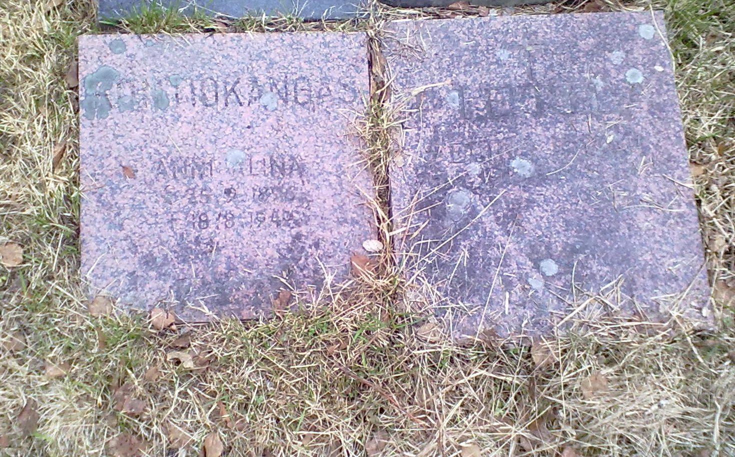 Kemin veritorstaissa 18. elokuuta 1949 kuolleiden Anni Kontiokankaan ja Felix Pietilän hautakivet